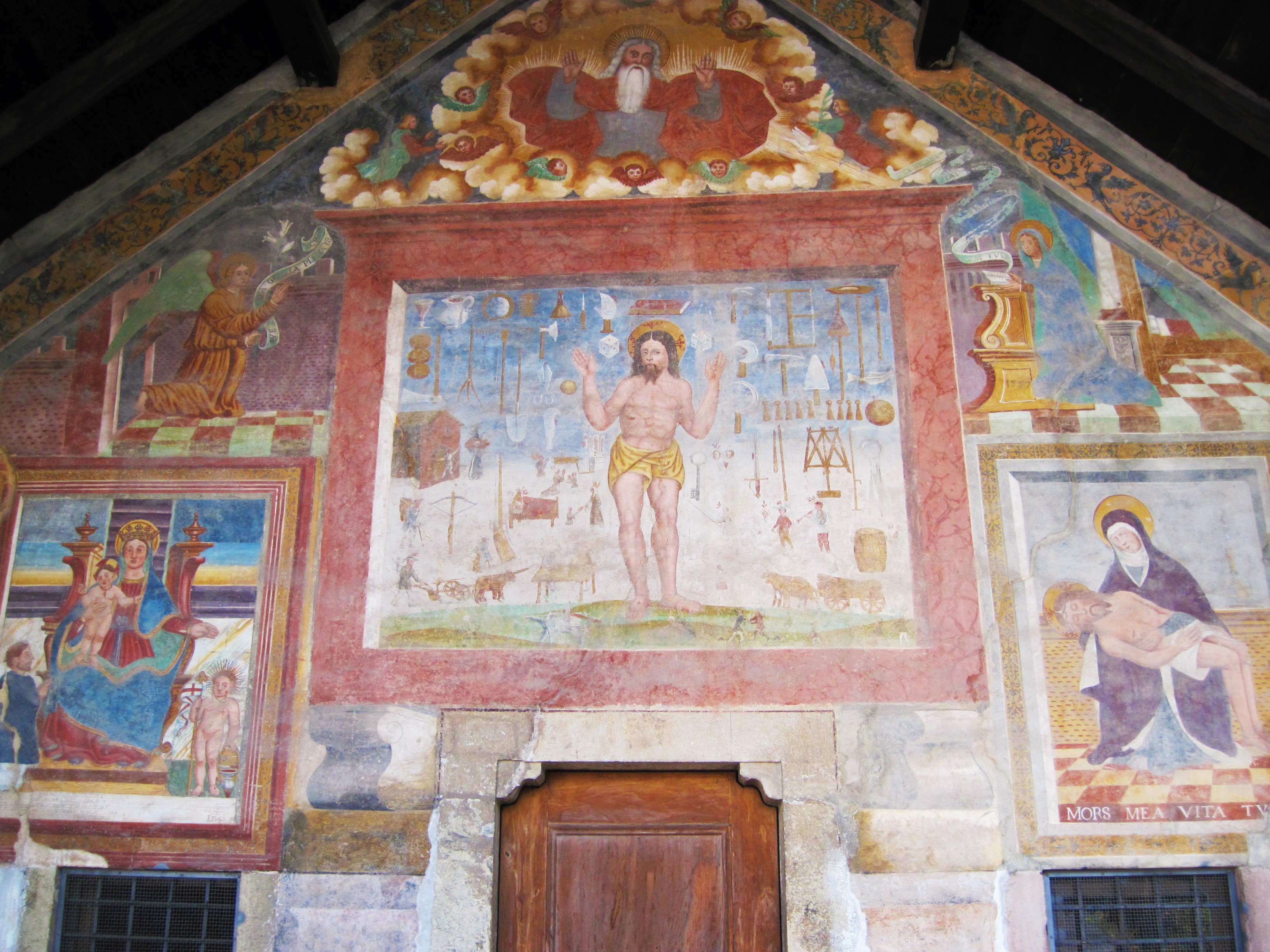 Tesero - Cappella di San Rocco